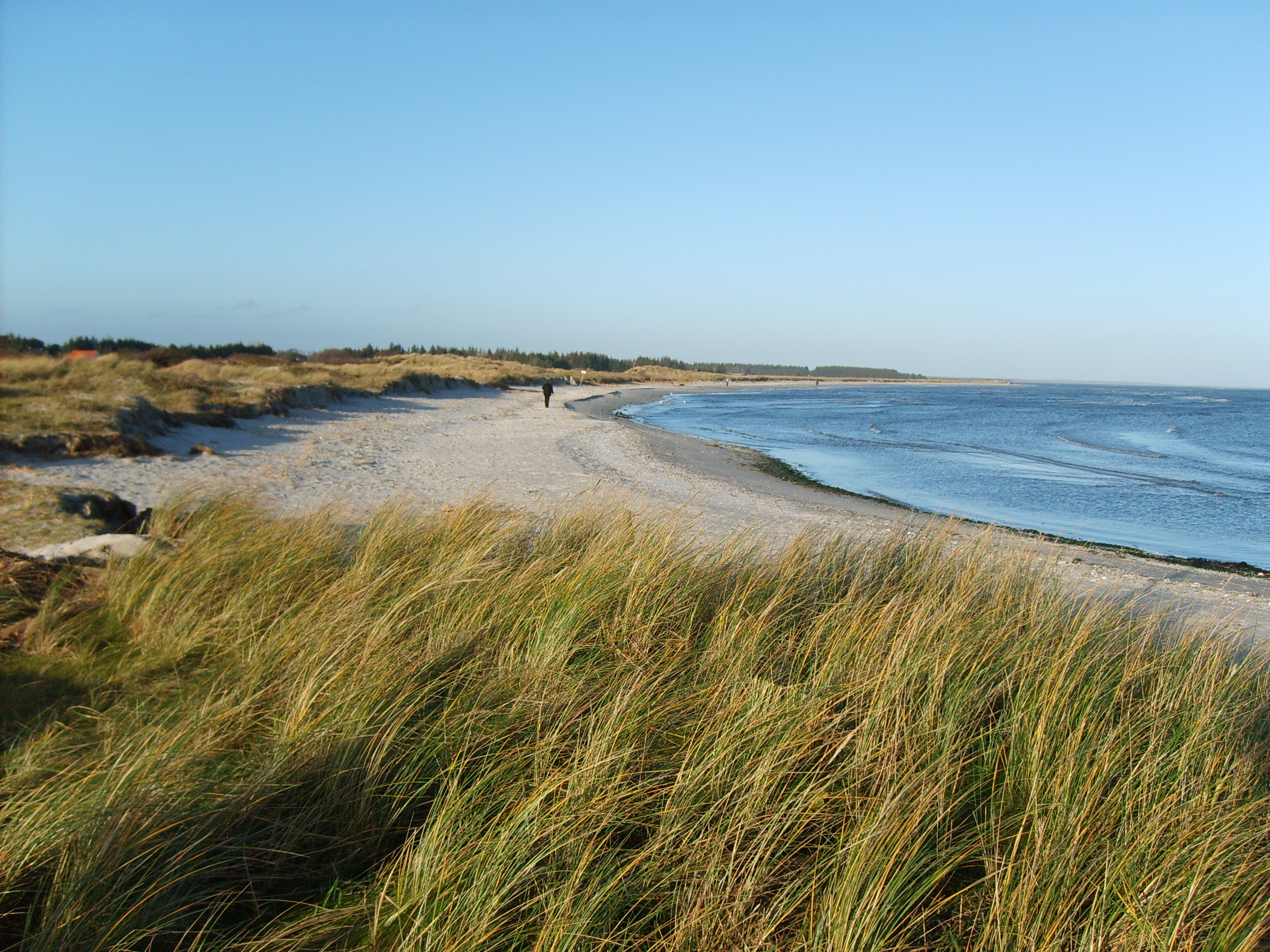 Billede af Hous nordlige strand, taget fra molen.